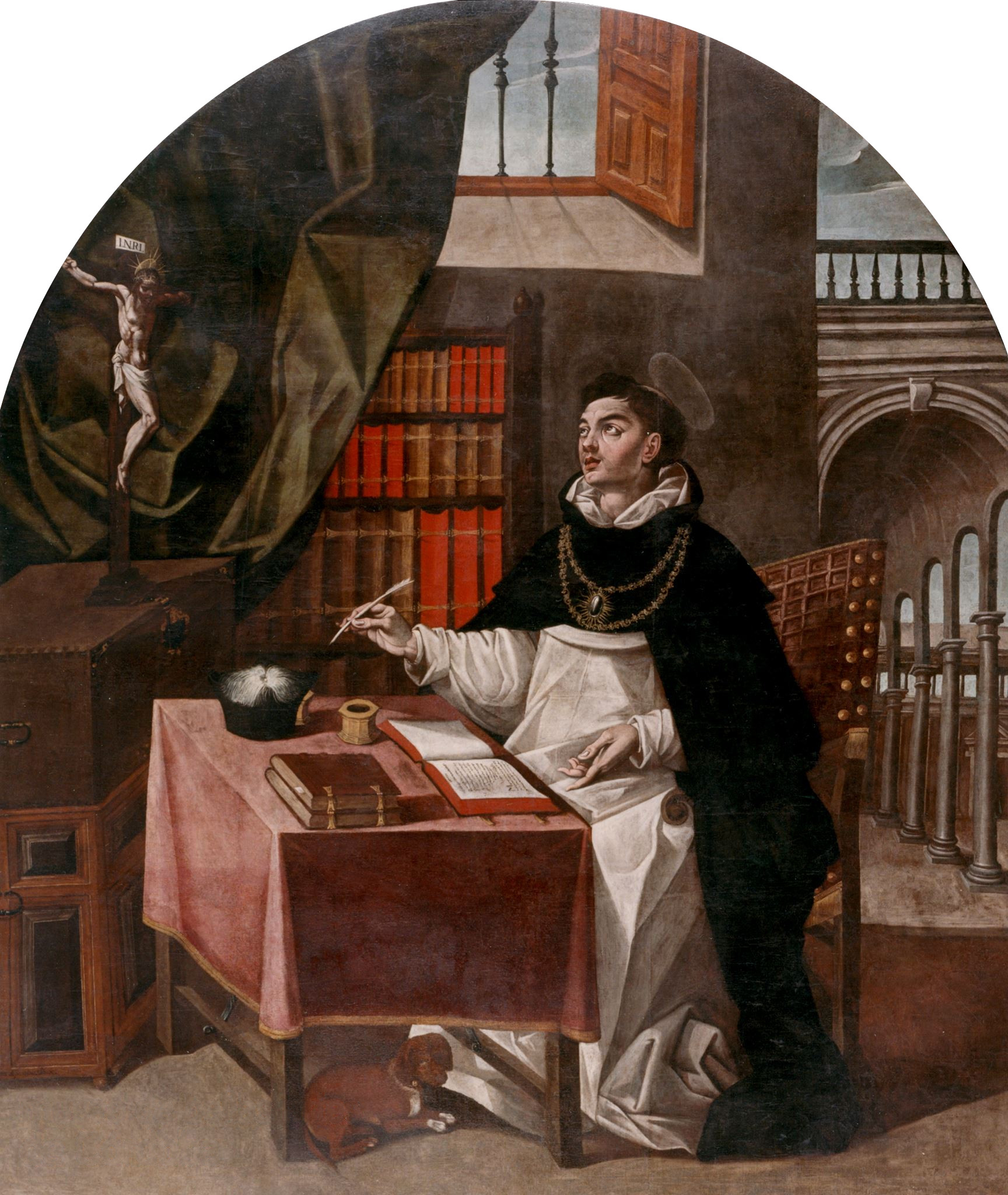 La obra representa al célebre teólogo dominico Santo Tomás de Aquino († 1274).